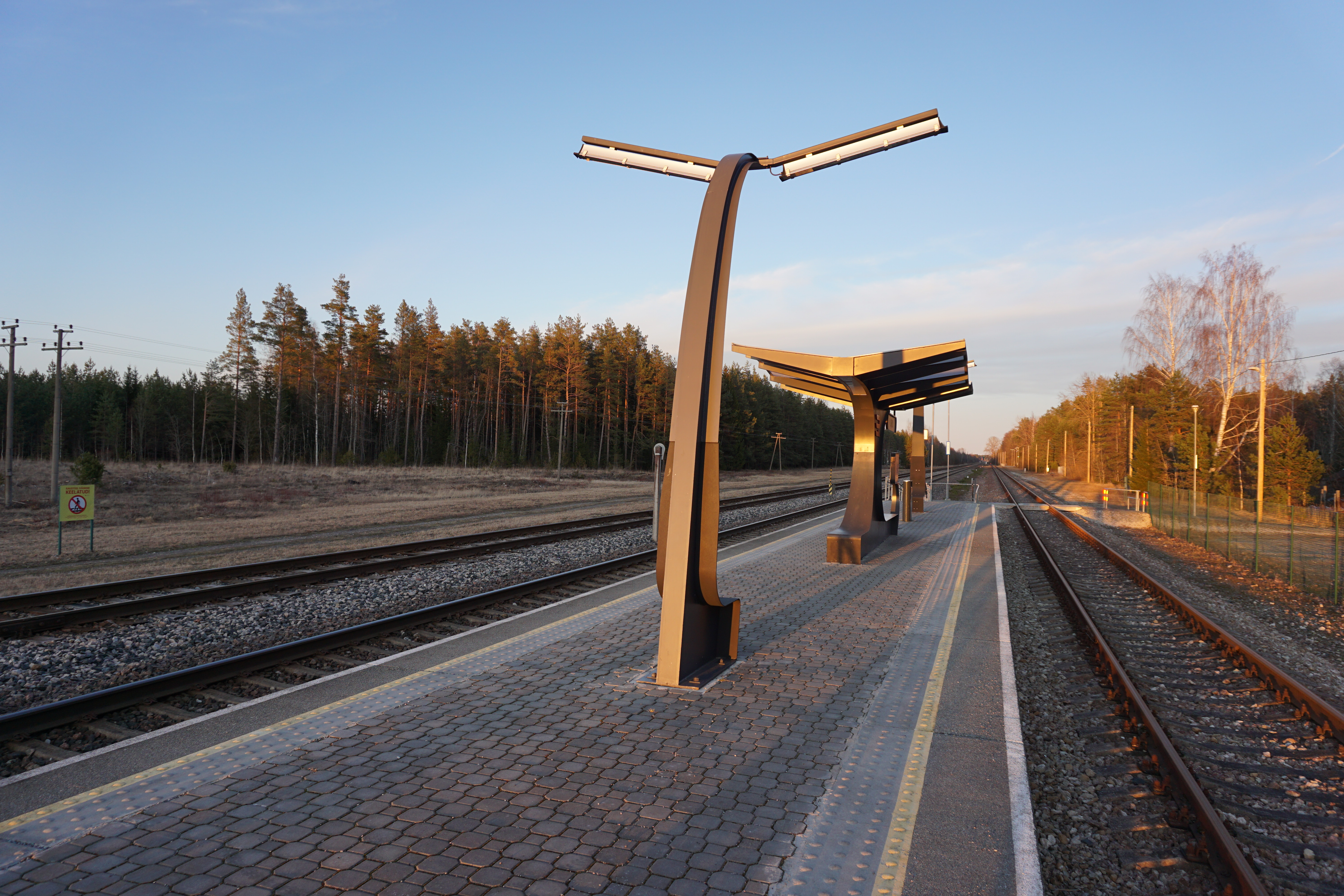 Oru raudteejaama perroon